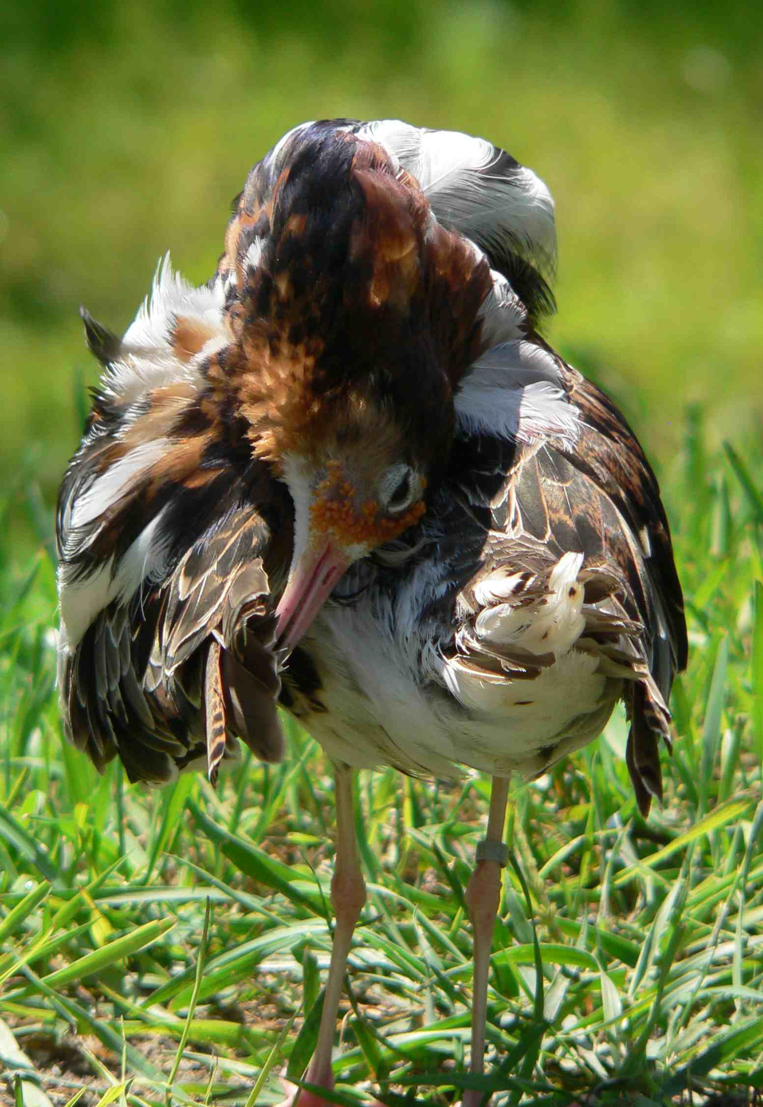 Bird preening